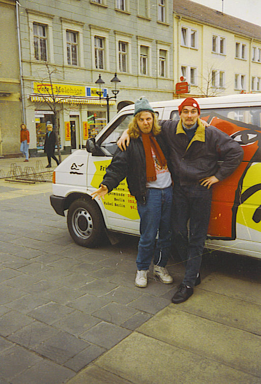 Mike Lehmann 1994 in Luckenwalde mit Fan Ranofuchs